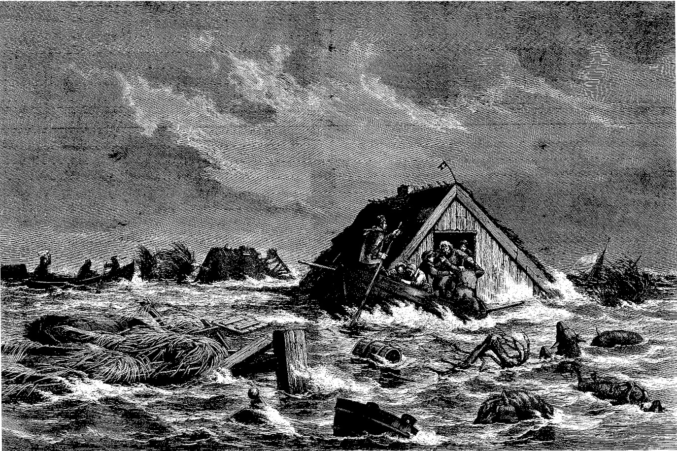 Stormfloden Sydfalster 13 november 1872